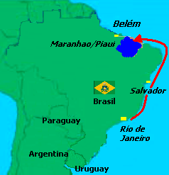 Revuelta en Maranhao/Piaui (Belém), 1838